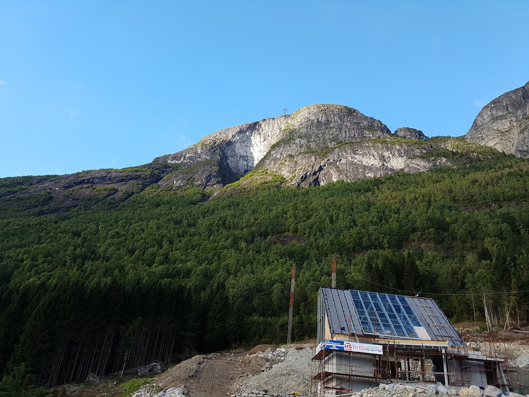 Hoven (1011 m.o.h.), sett fra fjordstasjon for Loen Skylift.